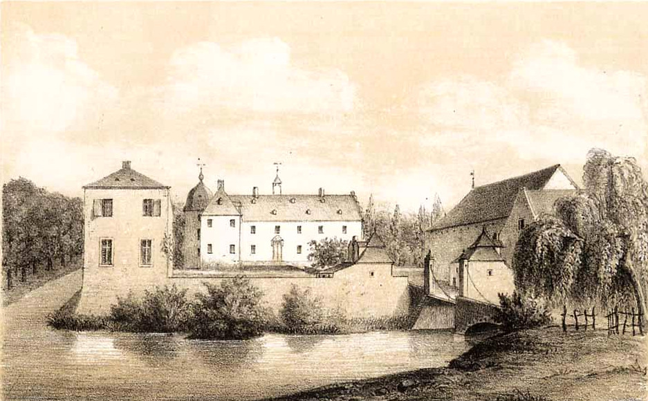 Burg Bachem in Frechen-Bachem, getönte Lithographie v. J.C. Baum n. C. Beckers, 1855, 12 x 16,5.: "Haus Bachem bei Frechen Eigenthum des Herrn Grafen von Fürstenberg Stammheim"